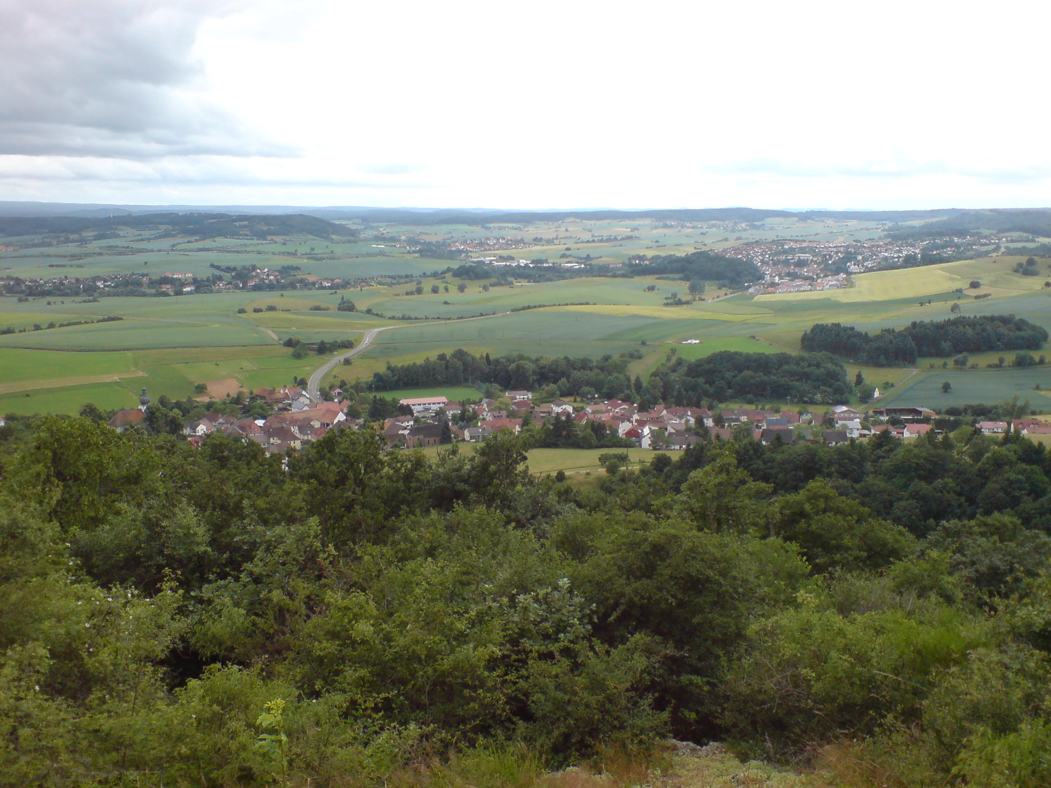 Imsbach von der Kupferberghütte aus gesehen.